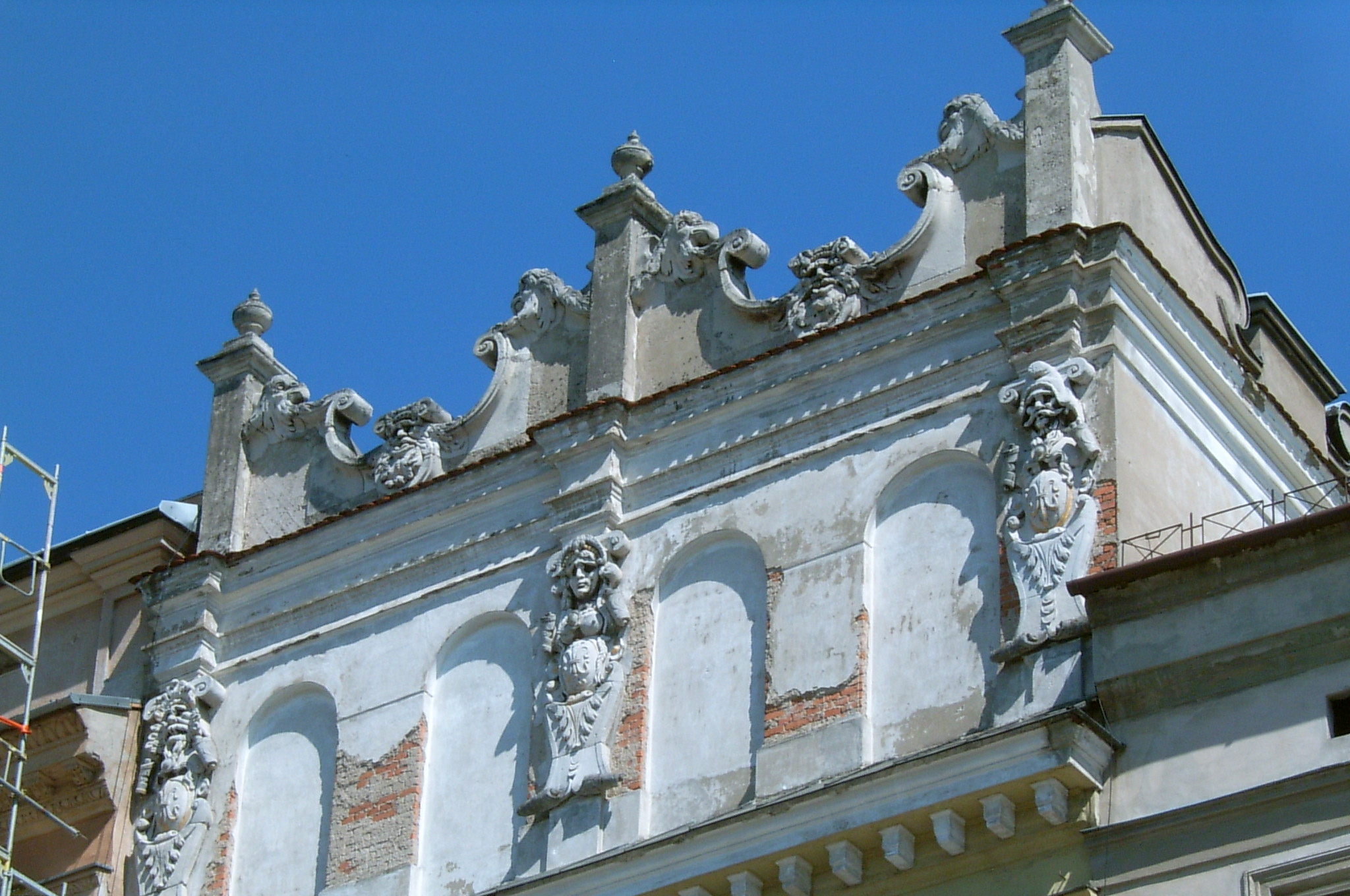 Kraków, Poland